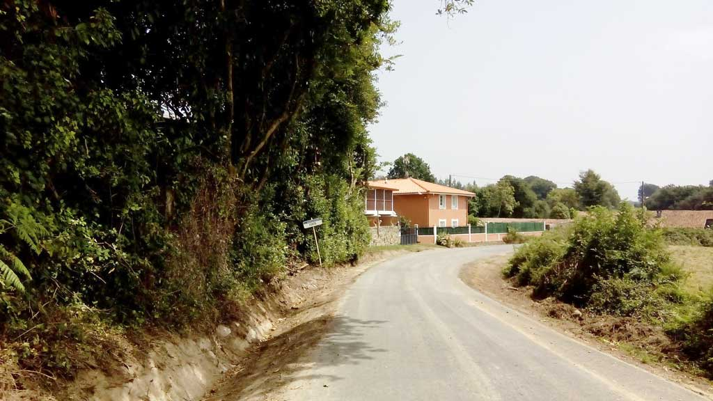 Vista de Fontá, Curtis.